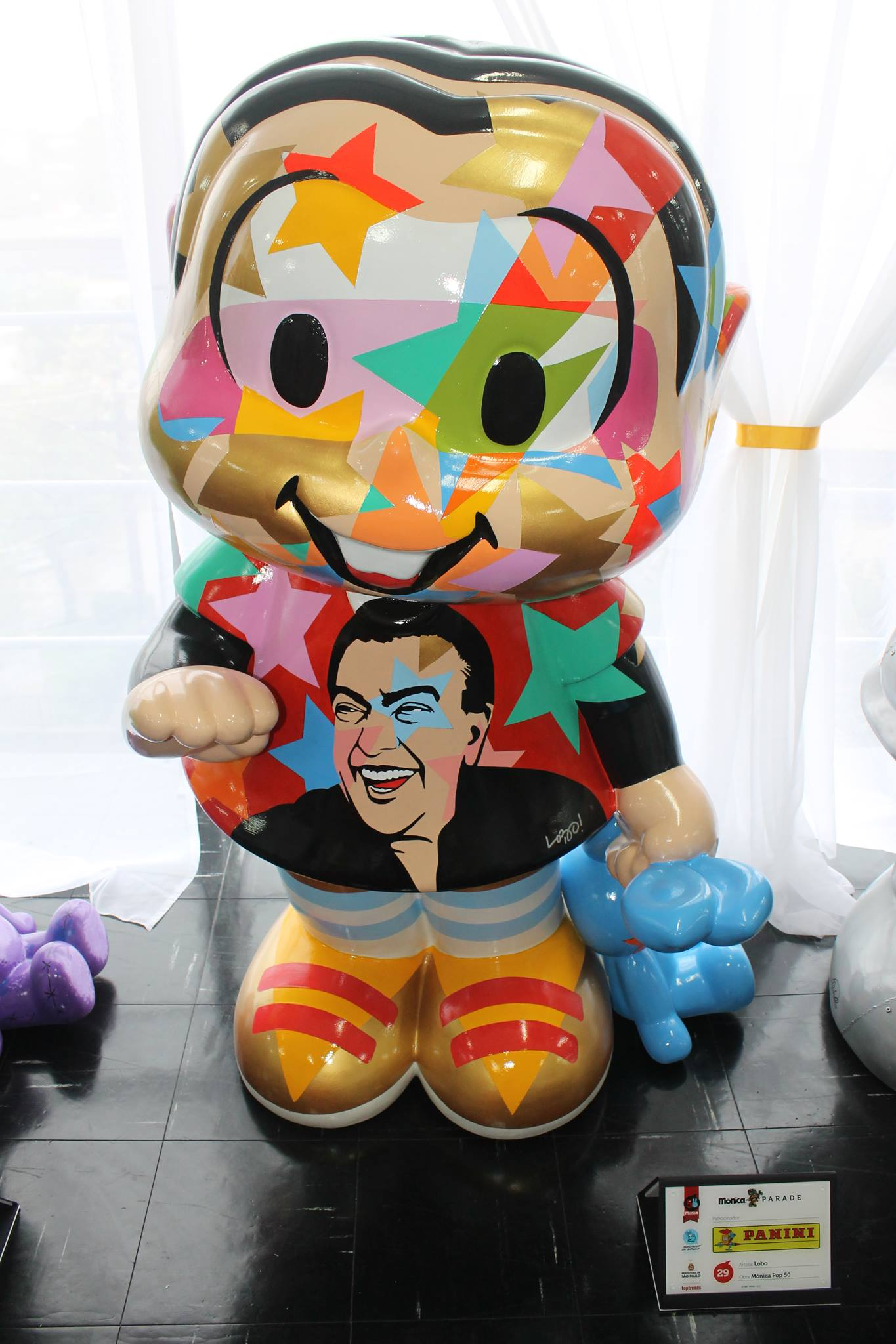 Artista Lobo participa do Mônica Parade em São Paulo (2013), o artista fez uma pintura em homenagem a Mauricio de Sousa.